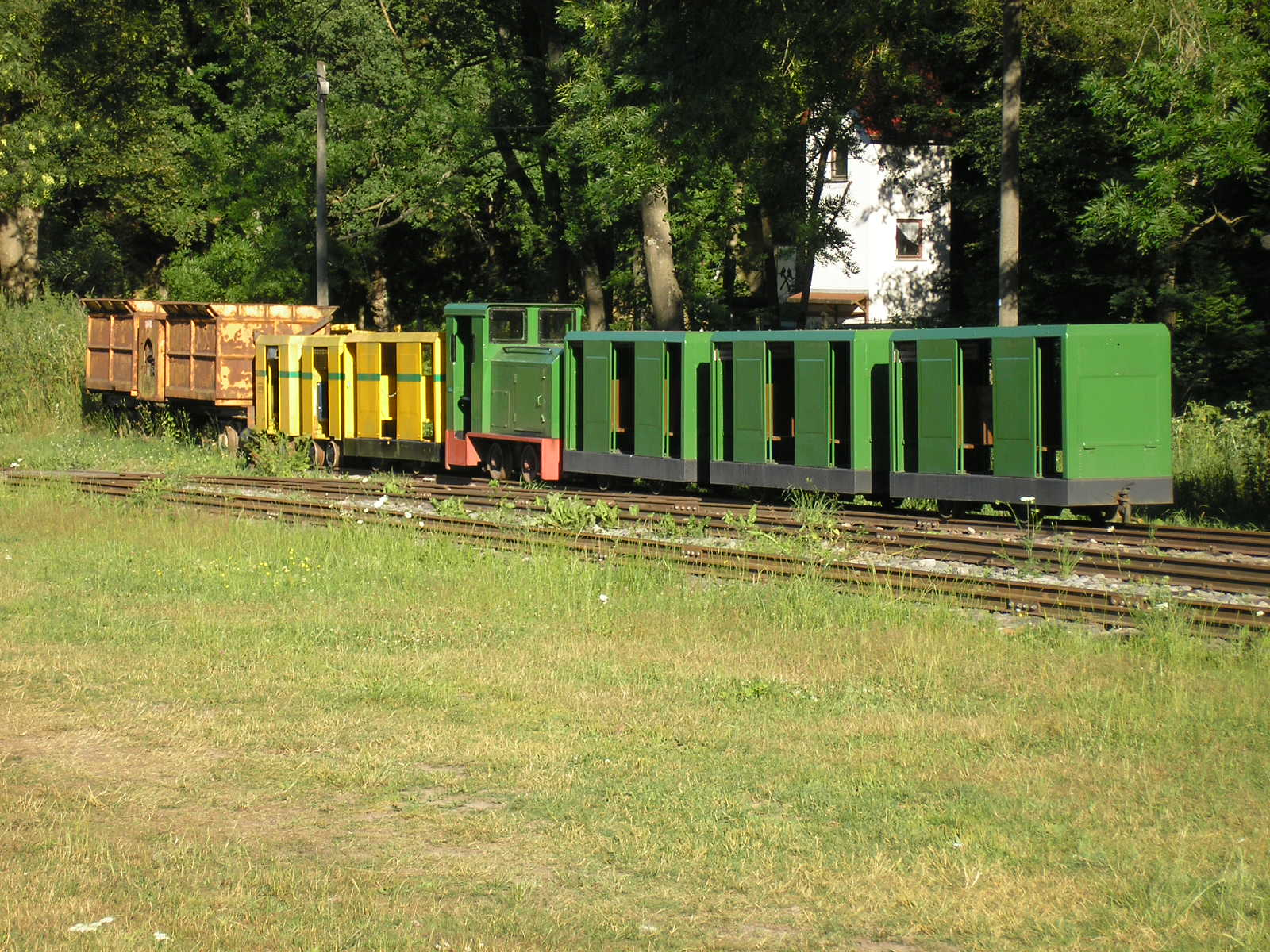 Ein Besucherzug des Schaubergwerkes "Volle Rose" bei Ilmenau (Thüringen).